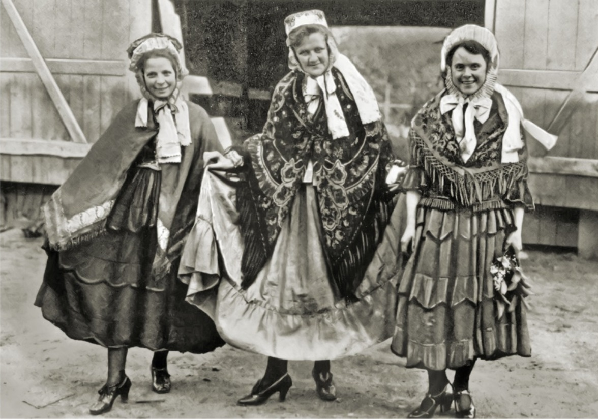 Frauen in Tracht des Ermlands